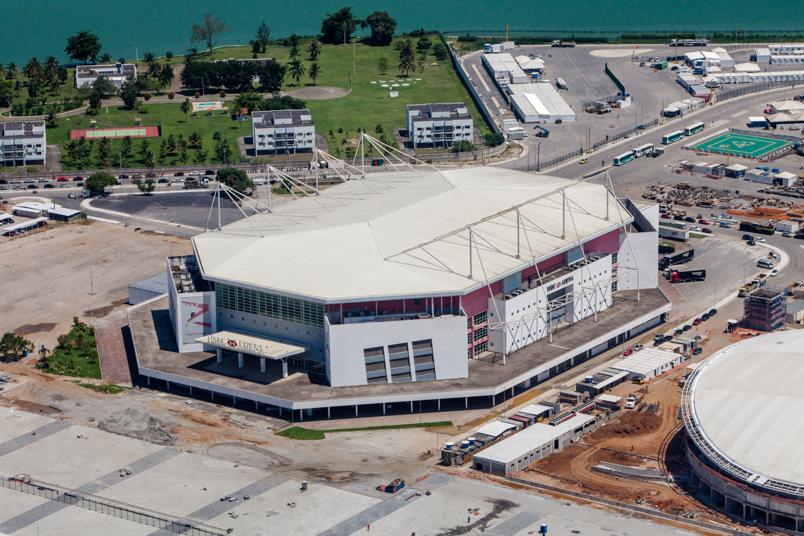 Arena Olímpica do Rio, no Parque Olímpico da Barra.